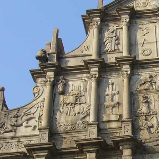 St paul ruins close up